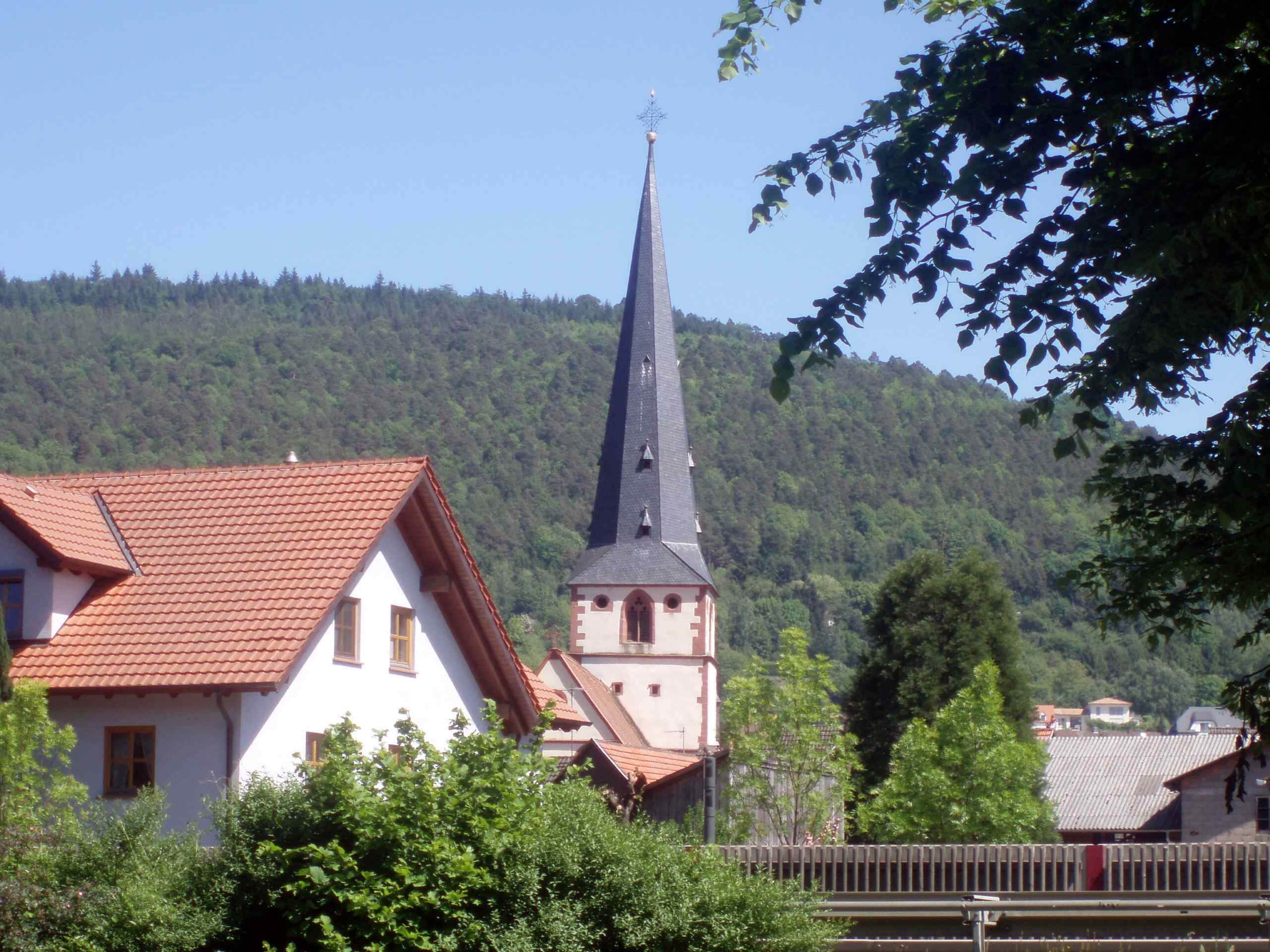 Kirche Bürgstadt